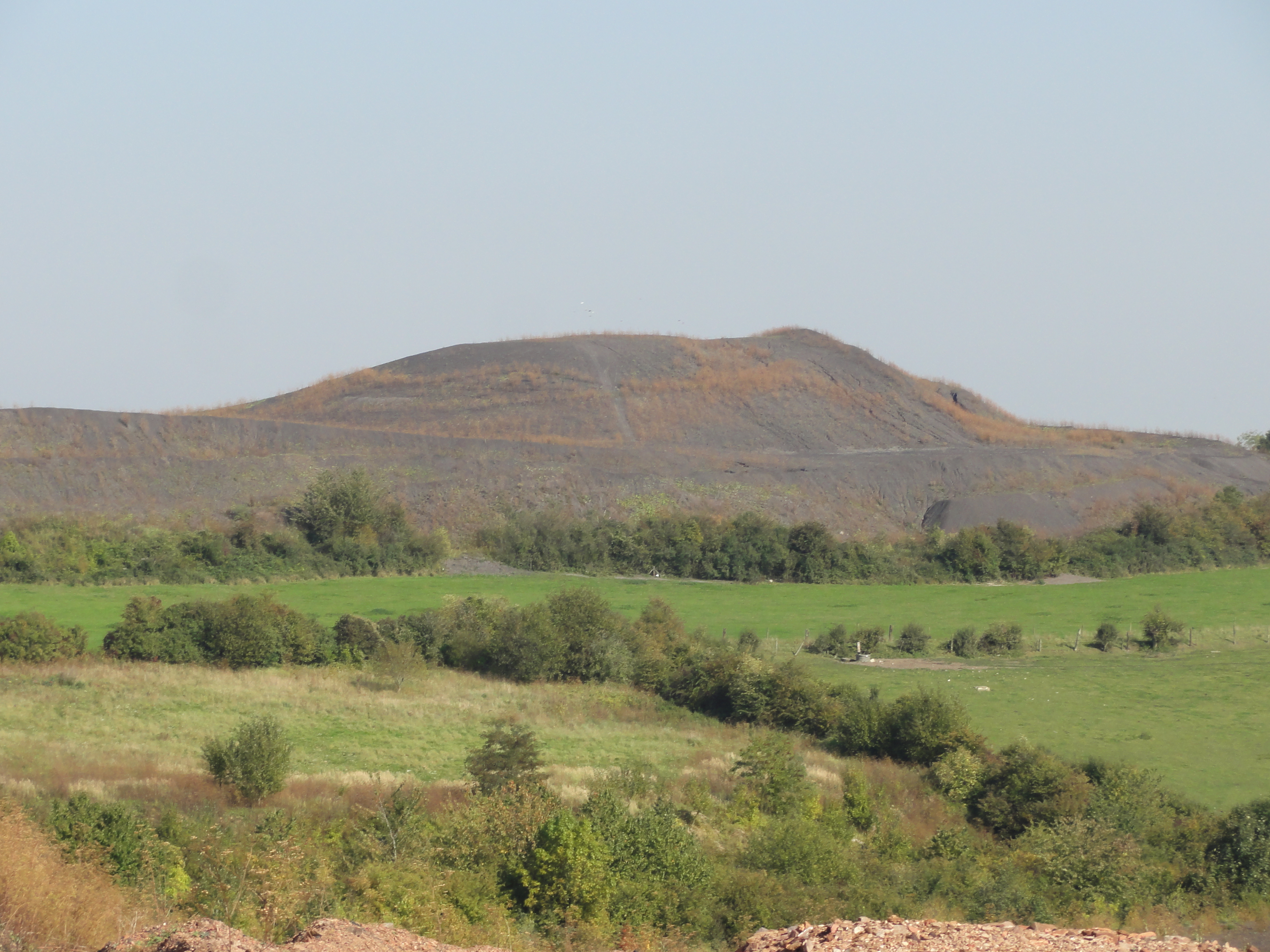 Terril n° 13 dit 3 d'Auchel Est, fosse n° 3 - 3 bis - 3 ter de la Compagnie des mines de Marles dans le bassin minier du Nord-Pas-de-Calais, Lozinghem, Pas-de-Calais, Nord-Pas-de-Calais, France.